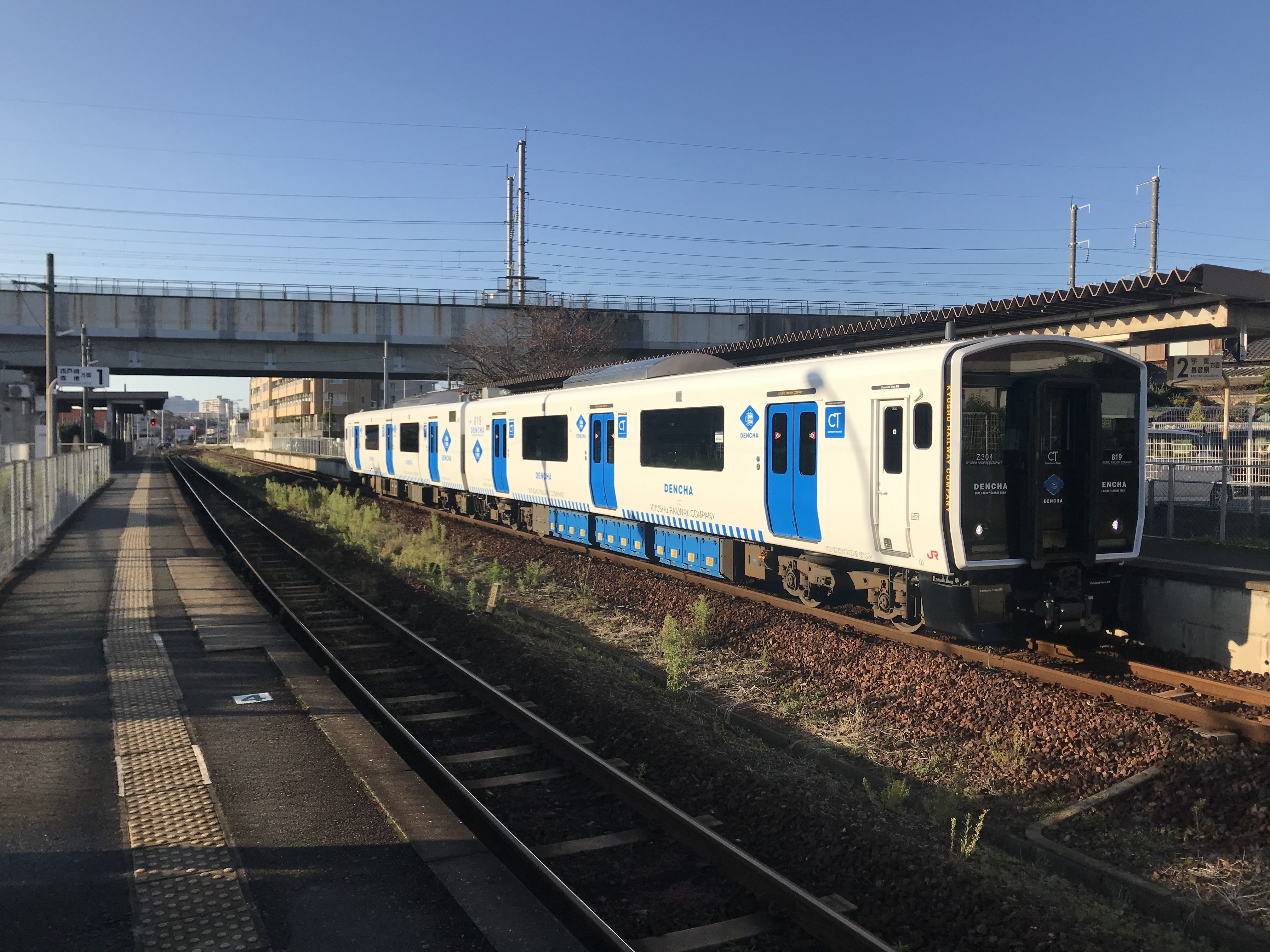 土井駅のホームと香椎線の列車(奥は舞松原方面)。上の高架鉄道は山陽新幹線